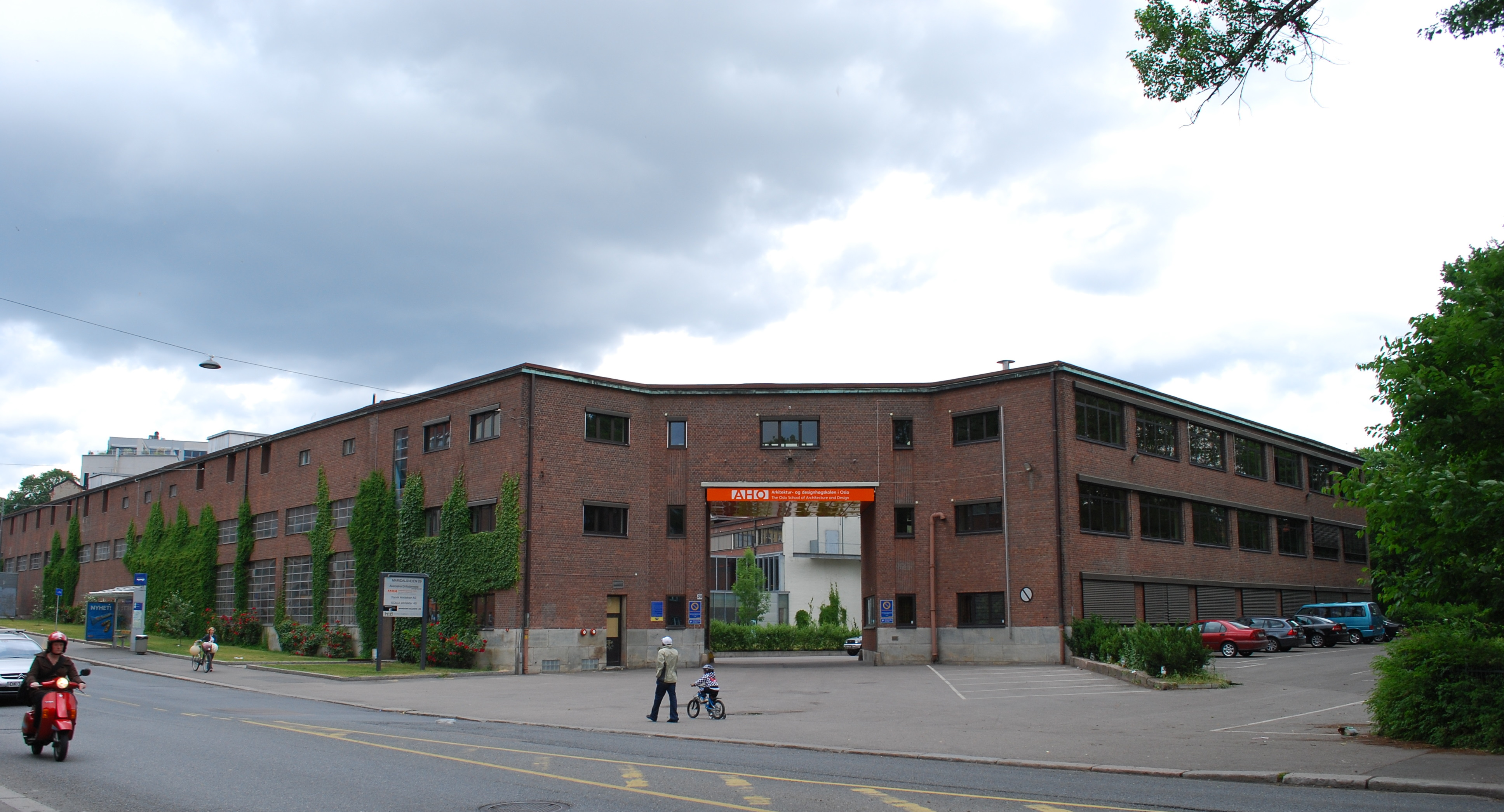 Arkitektur- og designhøgskolen (AHO), Oslo